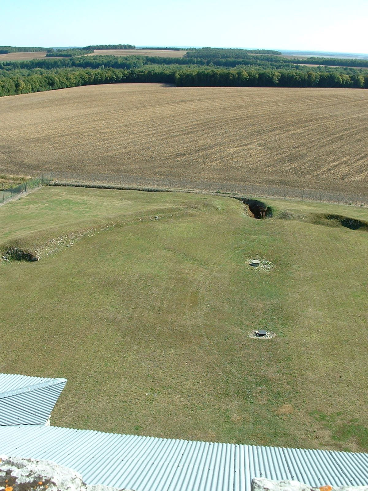 Château de Maulnes, Cruzy-le-Châtel, Yonne - traces des jardins